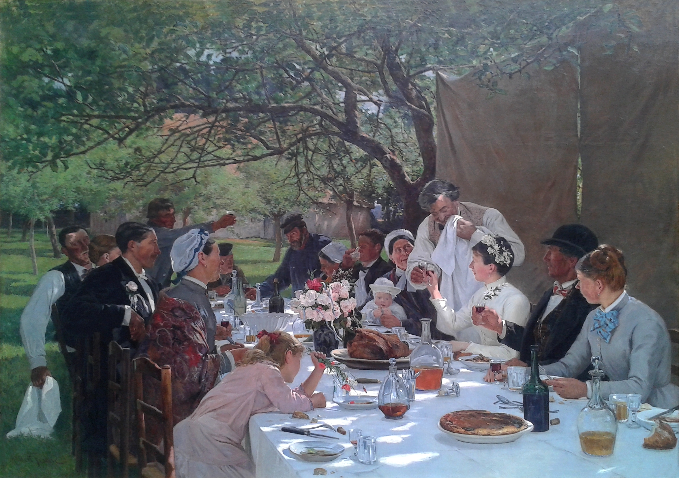 Albert Fourié (1854-1934), Un repas de noces à Yport, 1886, huile sur toile, musée des Beaux-Arts de Rouen. Exposé au Salon de 1887.